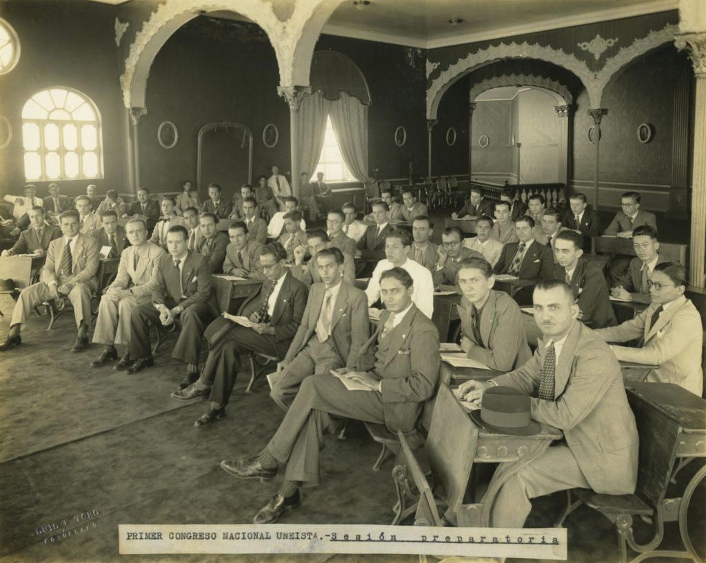 Reunión preparatoria del primer Congreso Nacional de la Unión Nacional de Estudiantes (UNE).